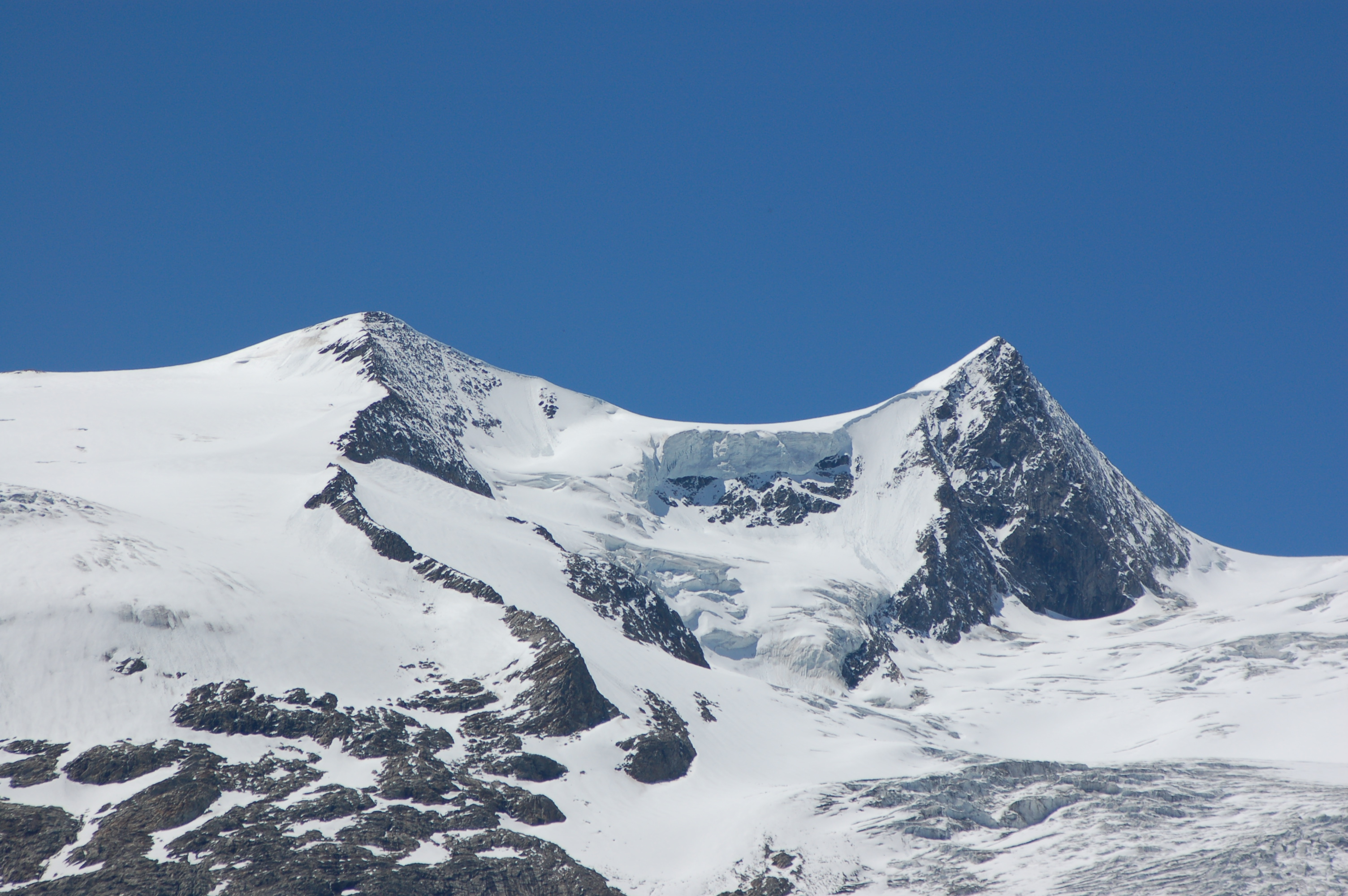 Hoher Zaun (links) und Schwarze Wand (rechts) gesehen vom Gschlößtal. Darunter der Schlatenkees